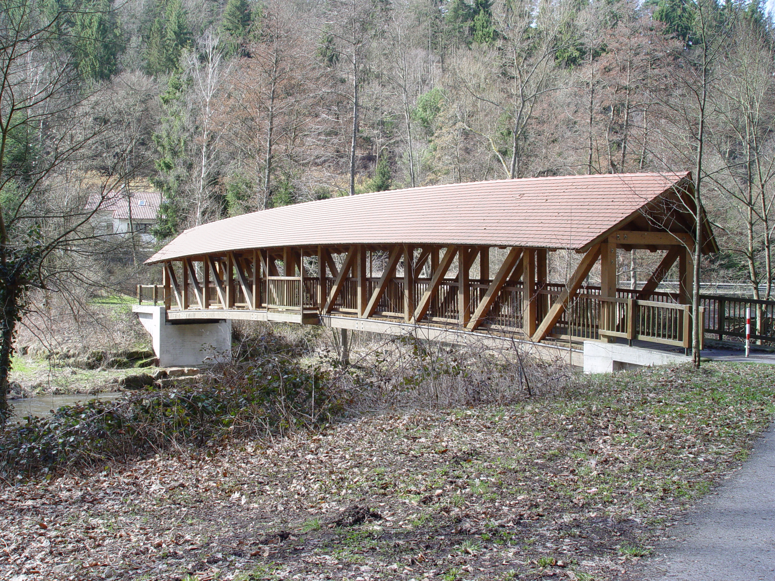 Motiv: Unterreichenbacher Brücke. Fotograf: Martin Dürrschnabel Kamera: Sony DSC-F717